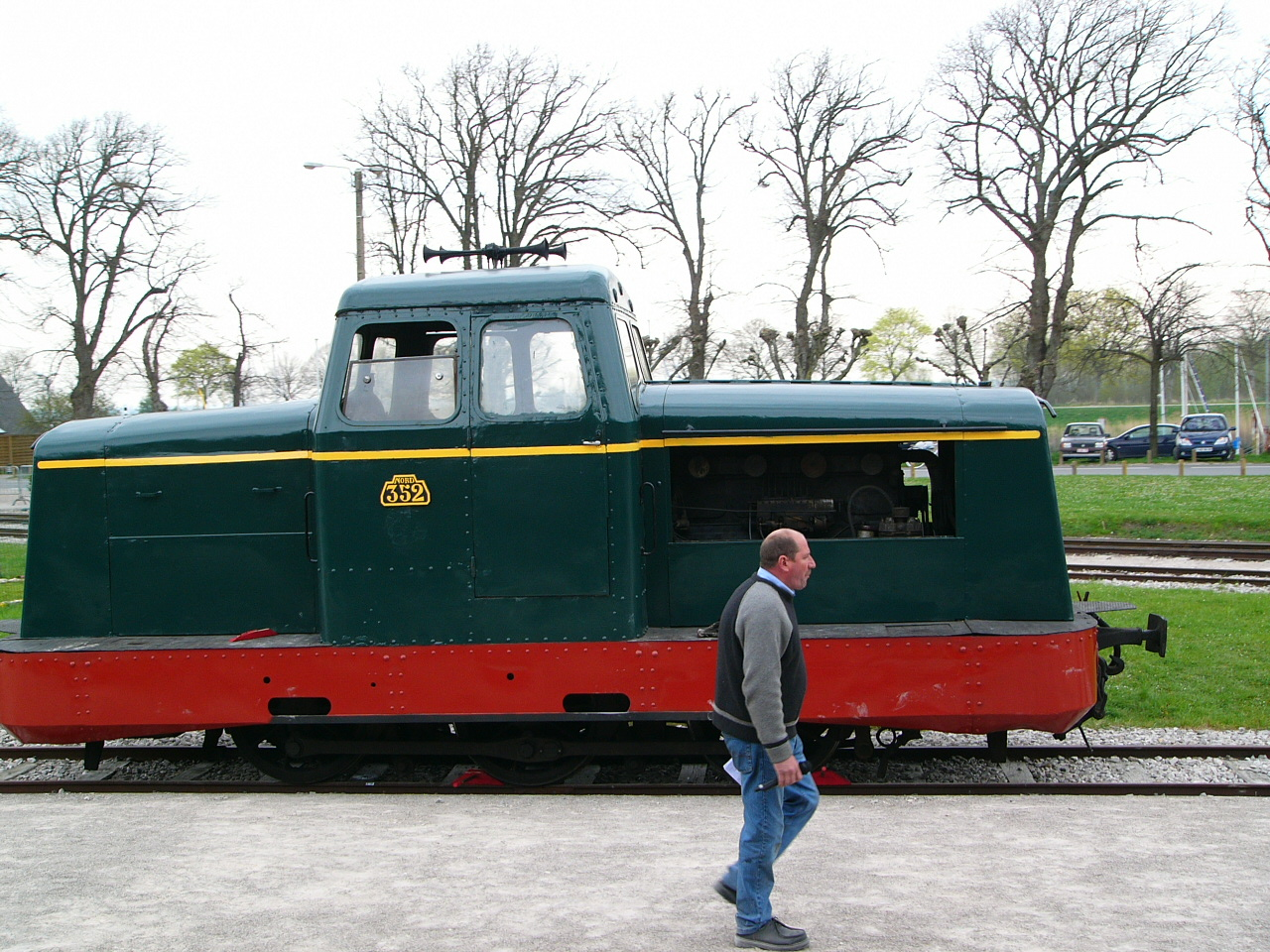 Fête de la vapeur 2006 au CFBS locotracteur 352 ex CFD Nord